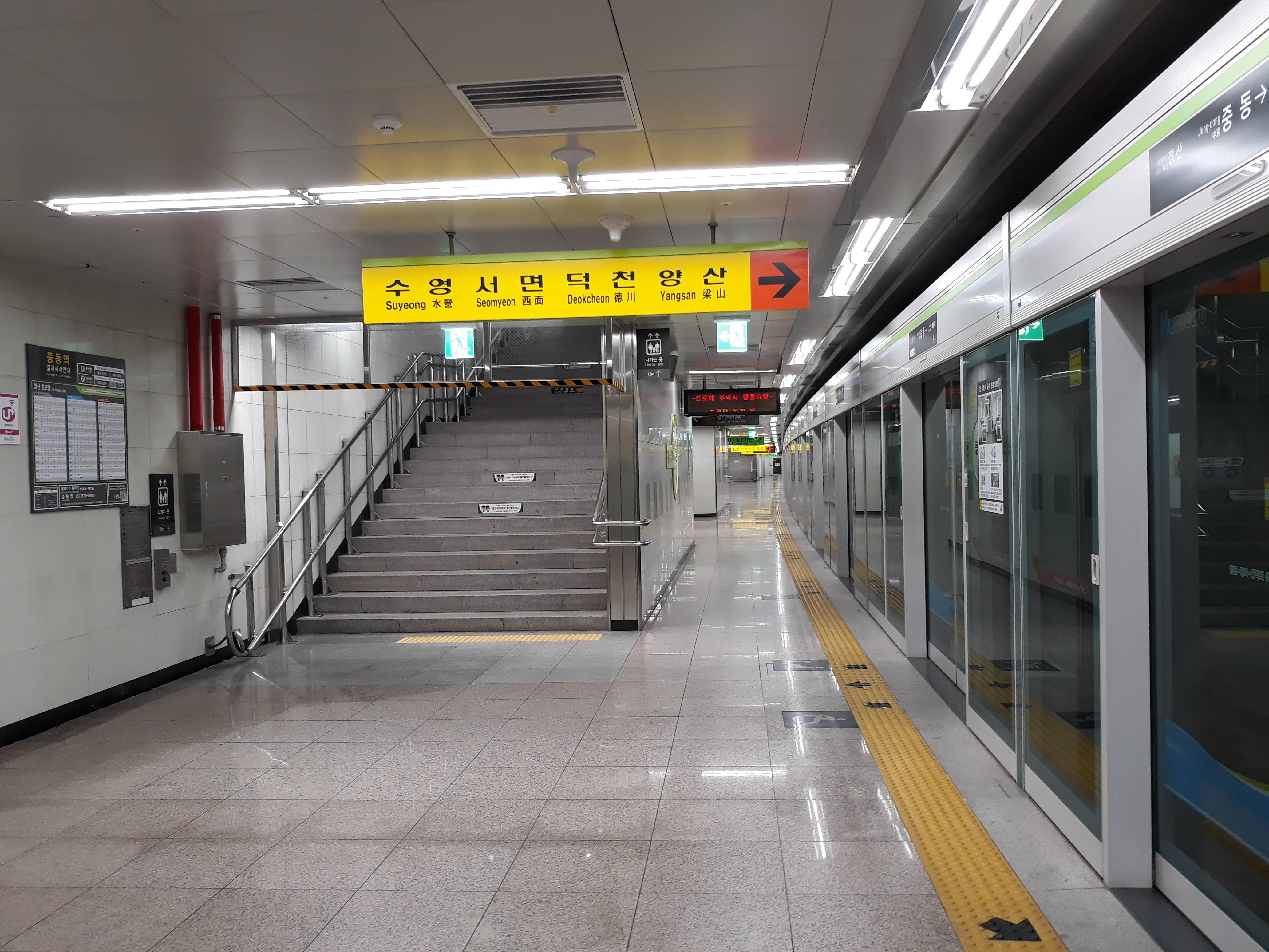 부산 도시철도 2호선 중동역 양산 방면 승강장